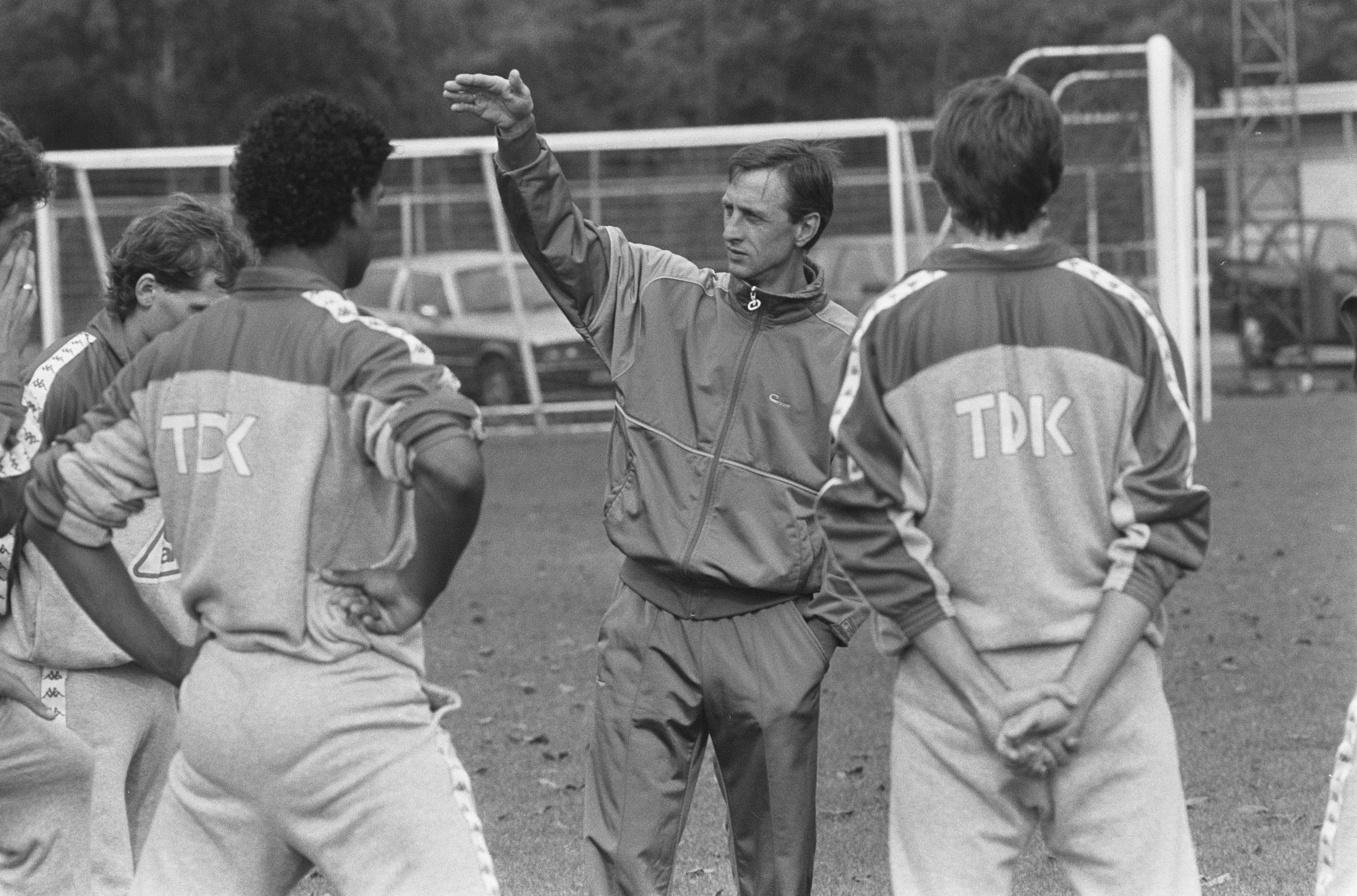 Collectie / Archief : Fotocollectie Anefo Reportage / Serie : [ onbekend ] Beschrijving : Johan Cruijff tijdens training Ajax Datum : 15 september 1987 Trefwoorden : sport, trainingen, voetbal Persoonsnaam : Cruijff, Johan Fotograaf : Molendijk, Bart / Anefo Auteursrechthebbende : Nationaal Archief Materiaalsoort : Negatief (zwart/wit) Nummer archiefinventaris : bekijk toegang 2.24.01.05 Bestanddeelnummer : 934-0756